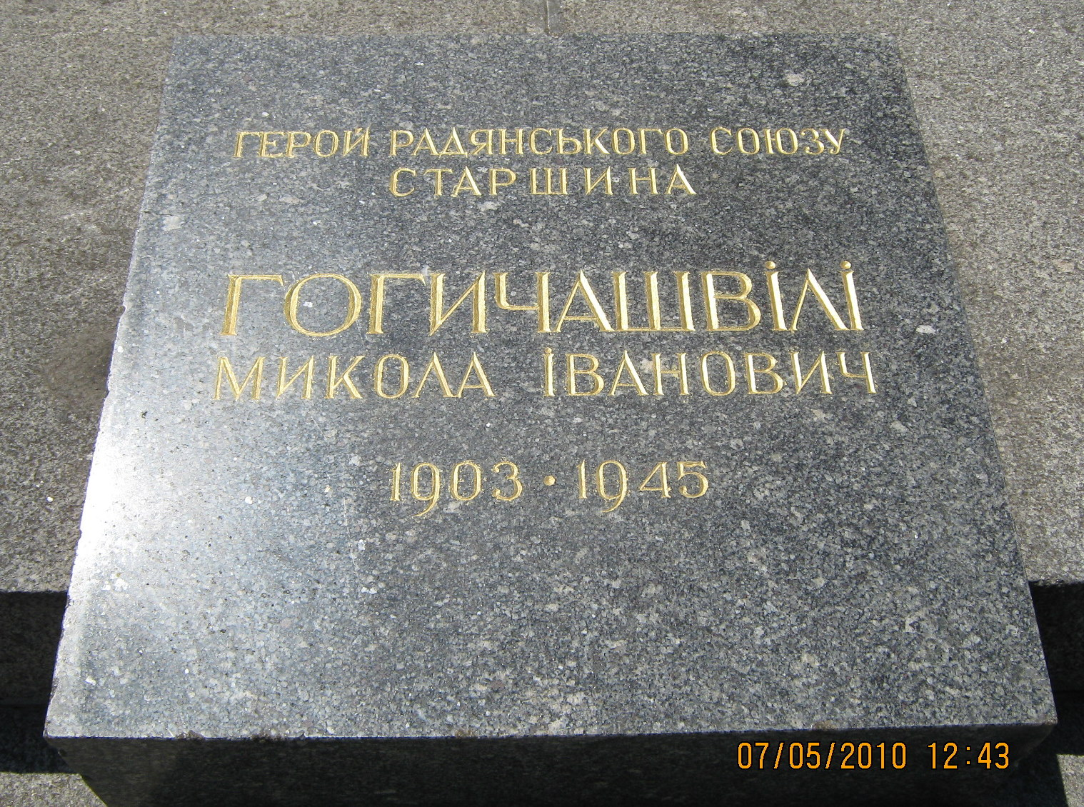 Меморіал Вічної Слави.